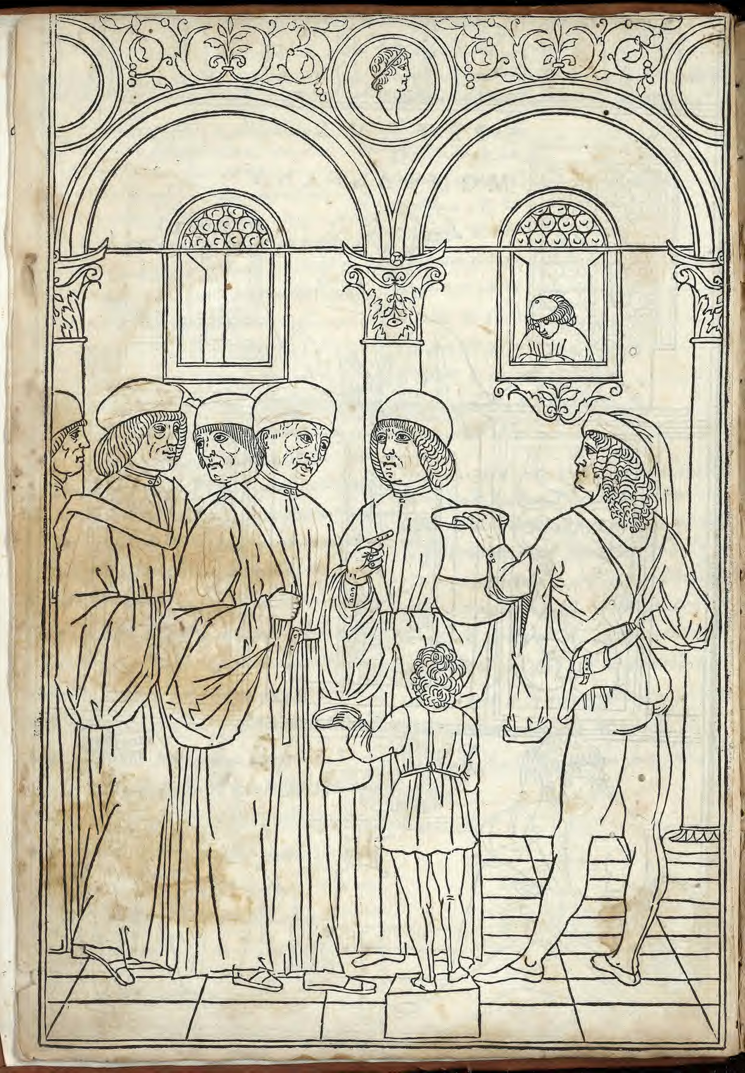 Fasciculus medicinae (italiano). - In Venexia : Stampato per Zuane & Gregorio di Gregorii, nel MCCCCLXXXXIII adi Y Februario